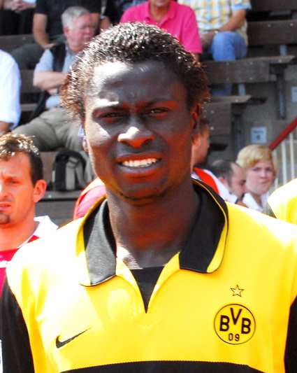 Sahr Senesie bei der Mannschaftsvorstellung